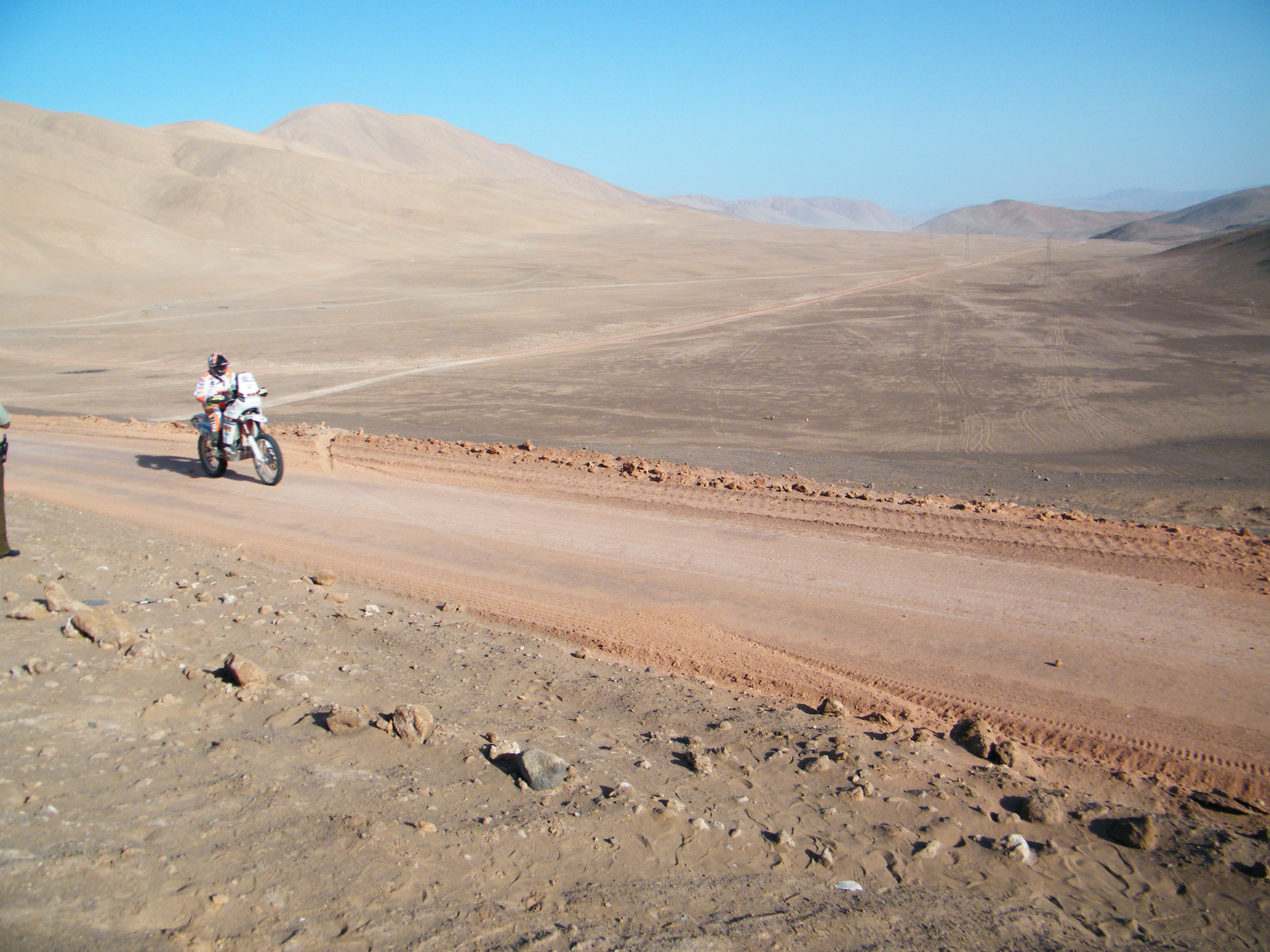 dakar 2011